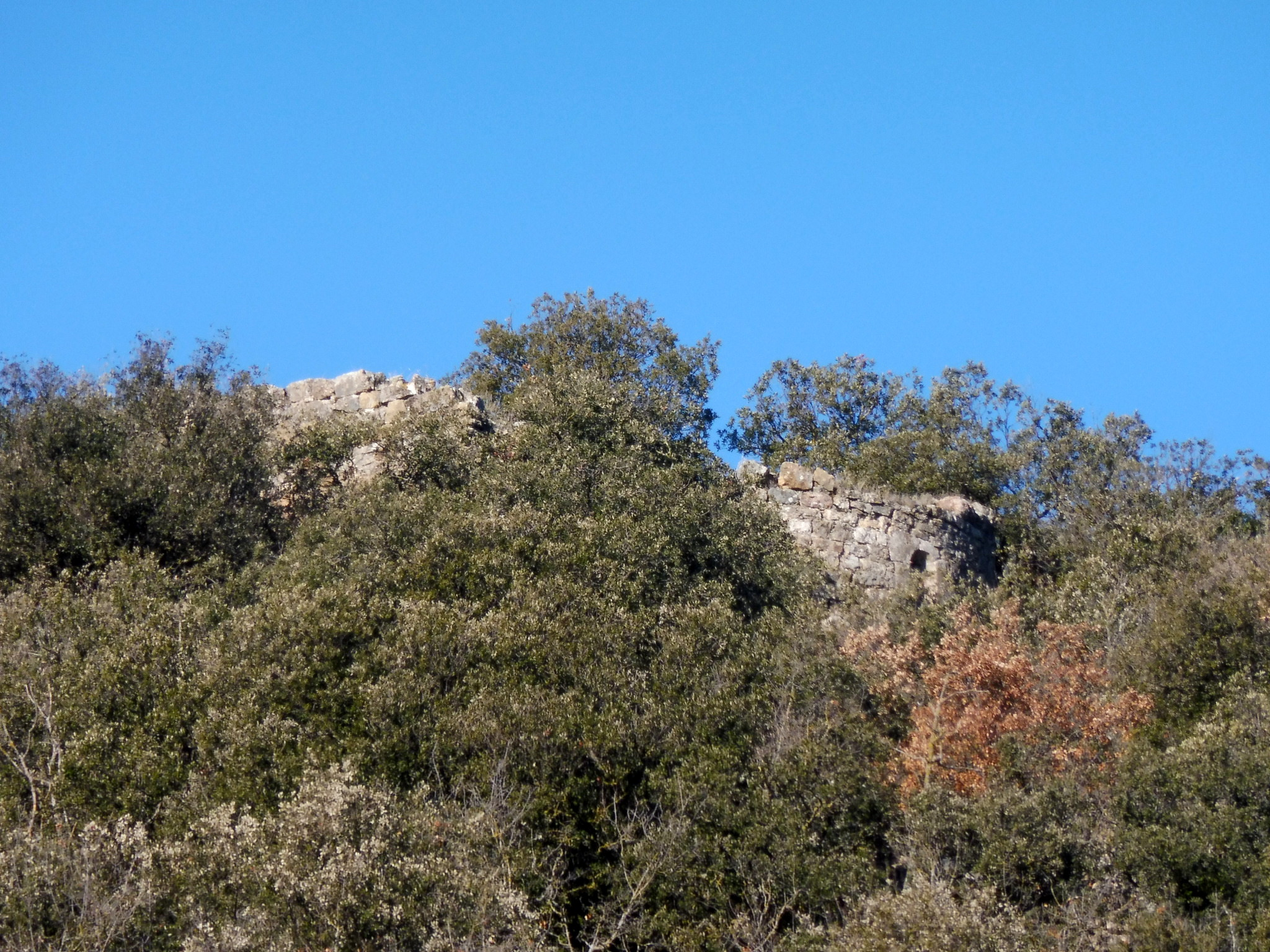 Fortificació i Sant Salvador del Vilot d'Alberola (Os de Balaguer)